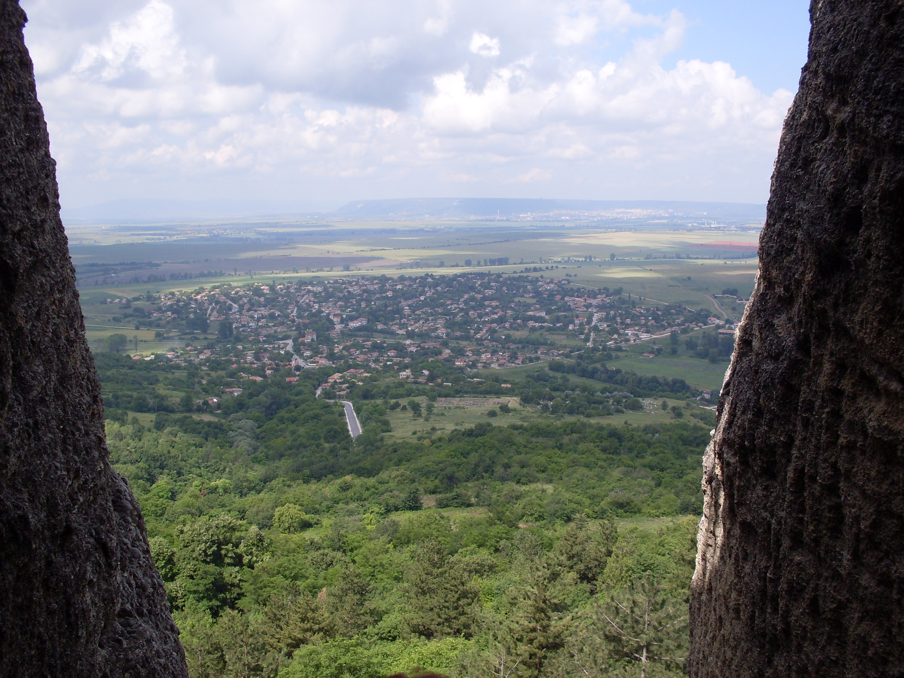 Madara